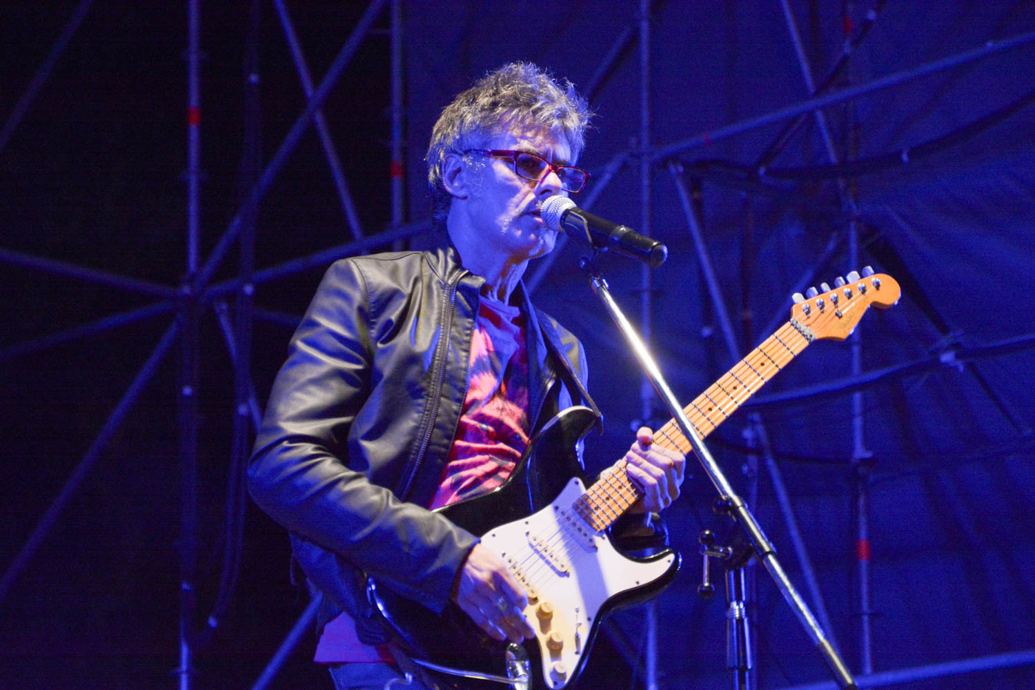 Fena Della Maggiora en 2015.